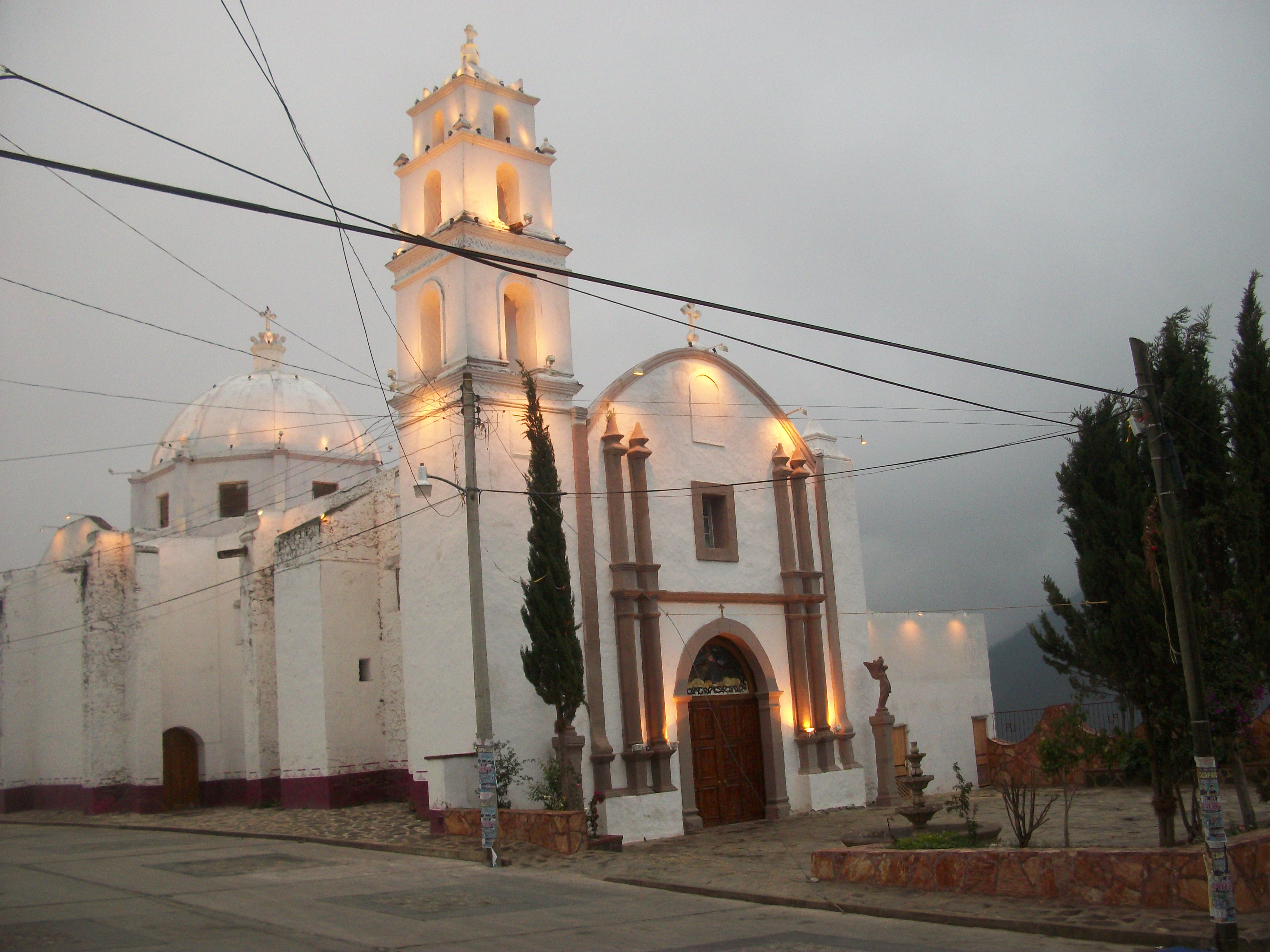 Fotografia de la capillita de nuestro Padre Jesus en Aquixtla Puebla. Aqui se encuentra el mayor tesoro del mundo.